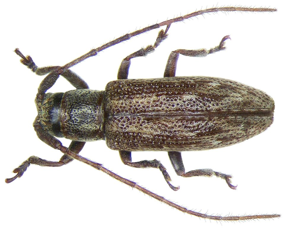 Familie: Cerambycidae Grösse: 5,5 mm Fundort: Indonesien Type, Coll. Museum, Paris Foto: U.Schmidt, 2007